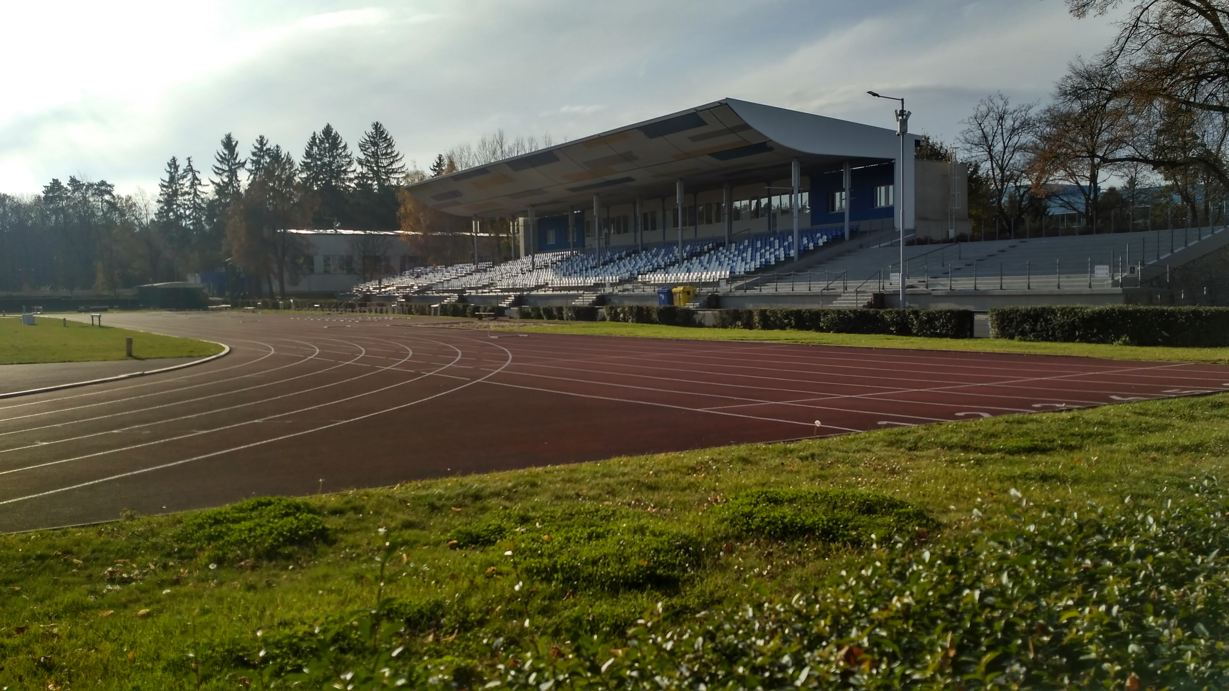 tribuna pro diváky po rekonstrukci